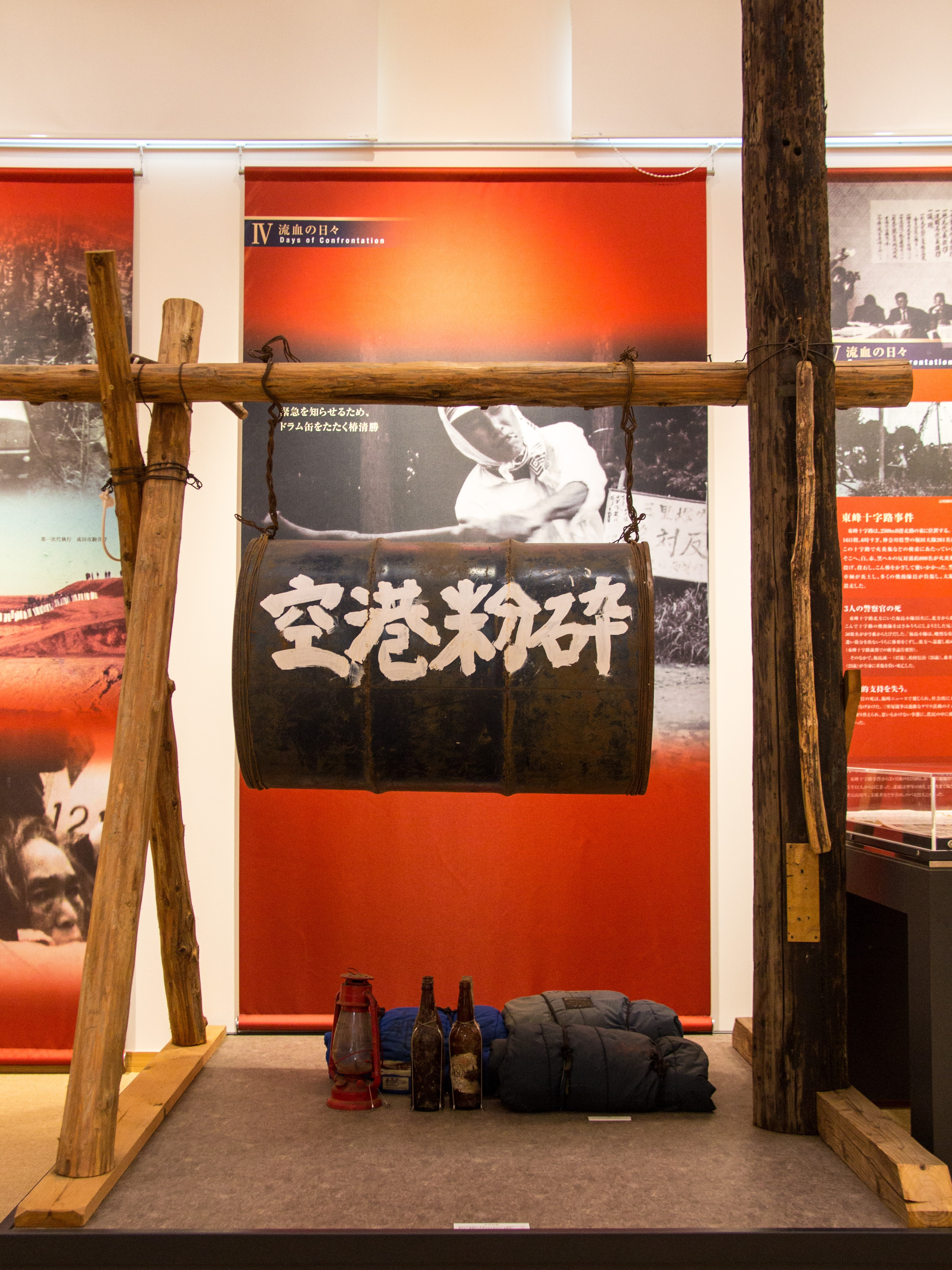 成田空港 空と大地の歴史館にて。ドラム缶レプリカ。